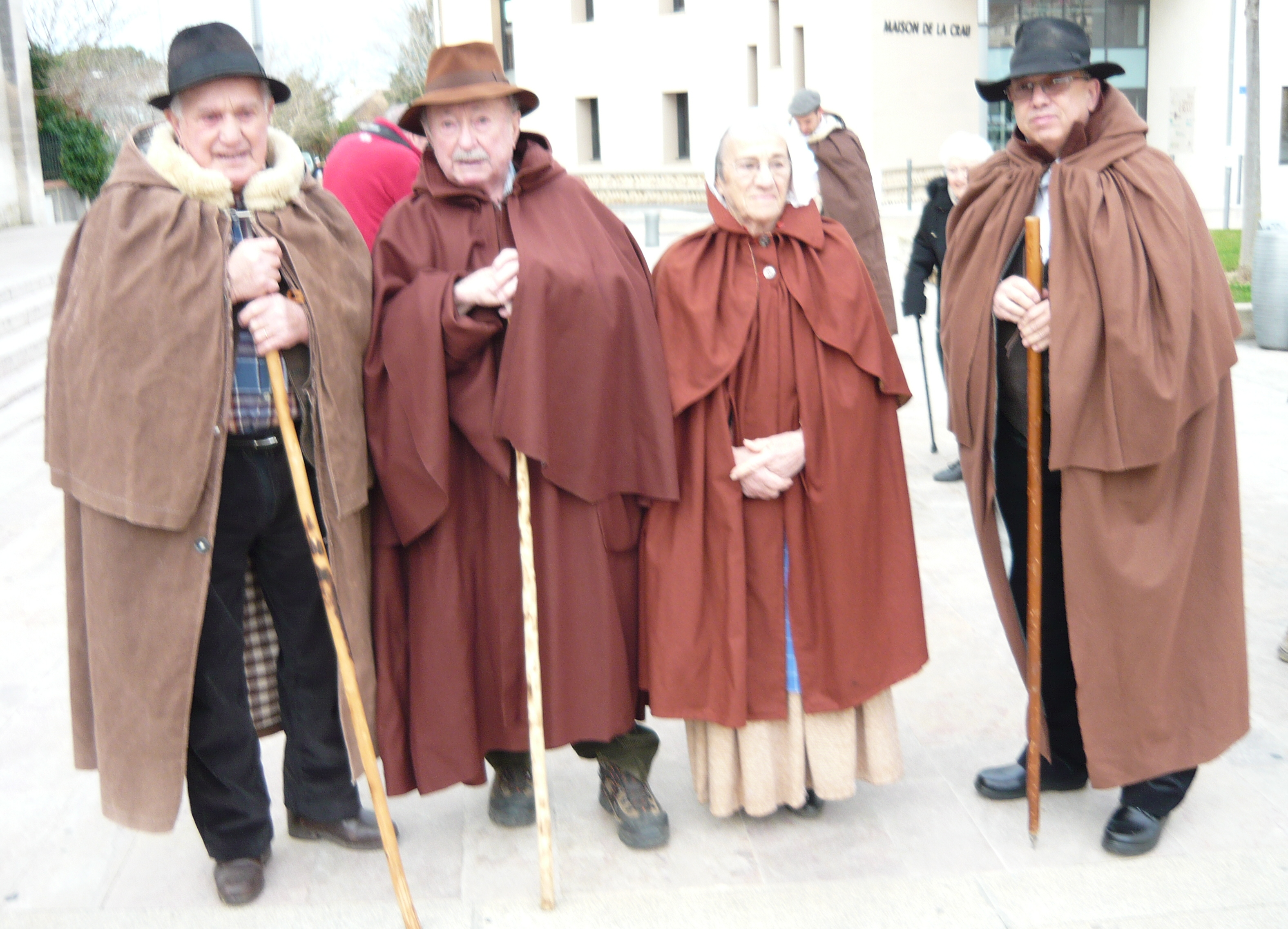 Bergère et bergers de la Crau lors d'un pastrage